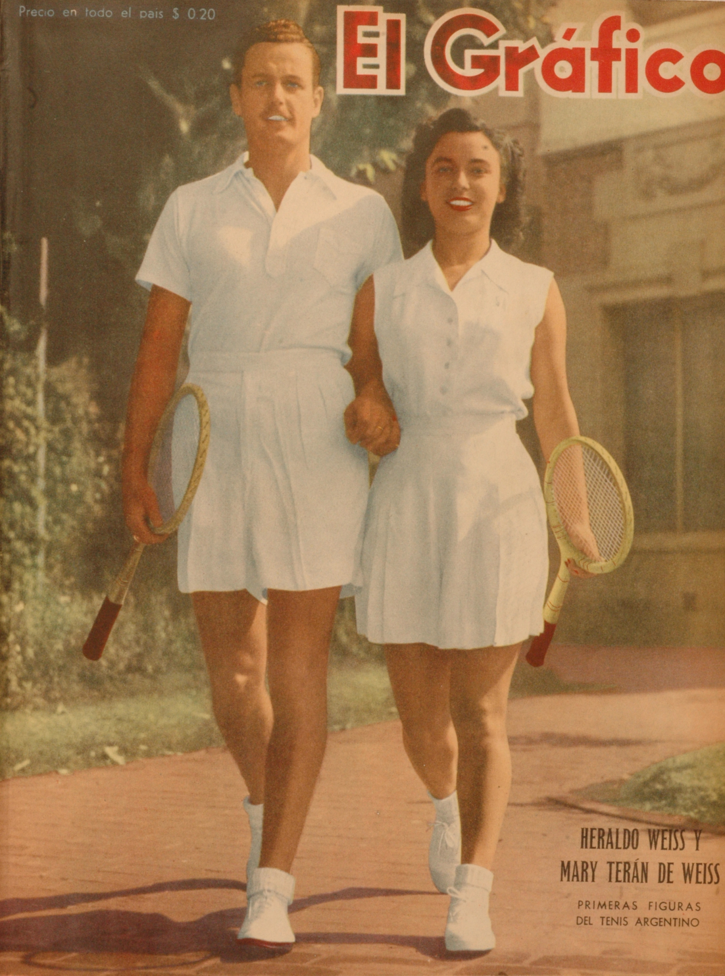 El Grafico del 09 de Febrero de 1945. Edicion 1335